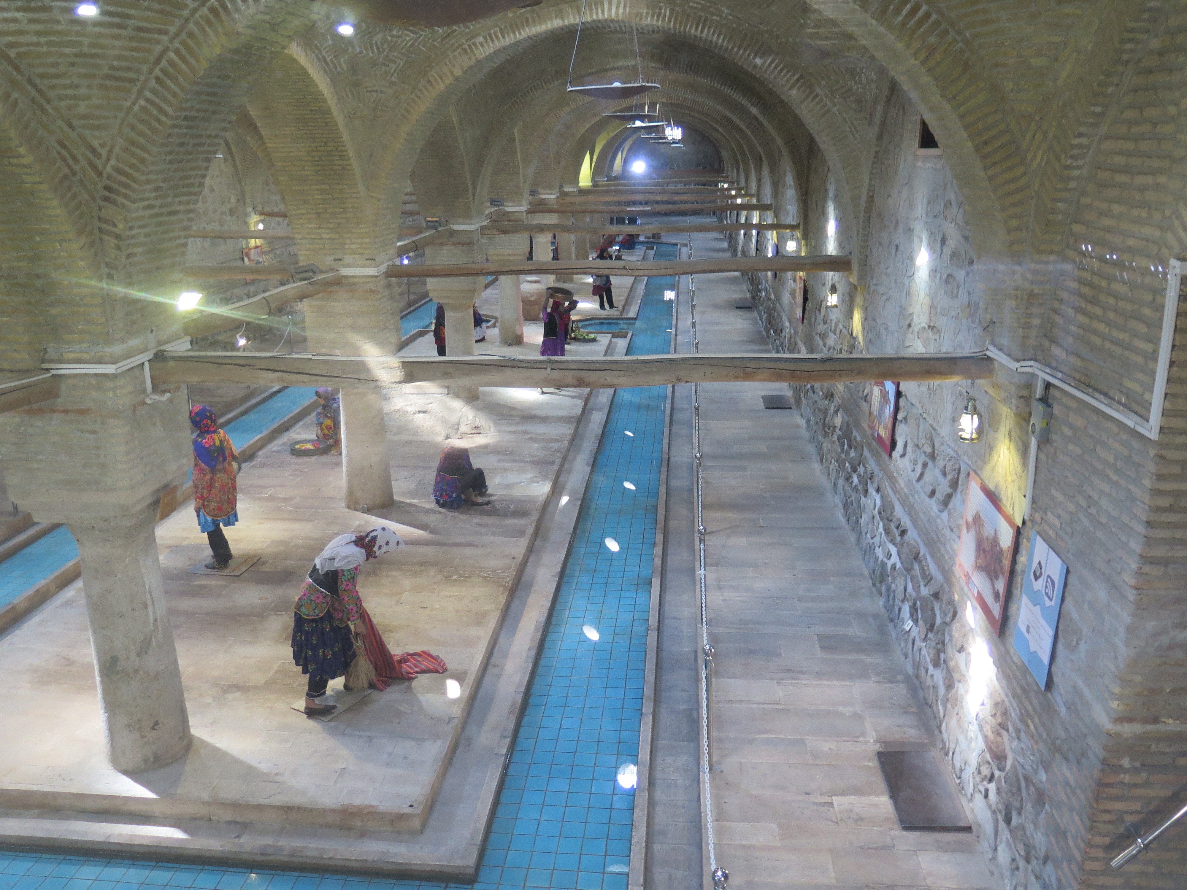 بنای رخت‌شوی‌خانه زنجان